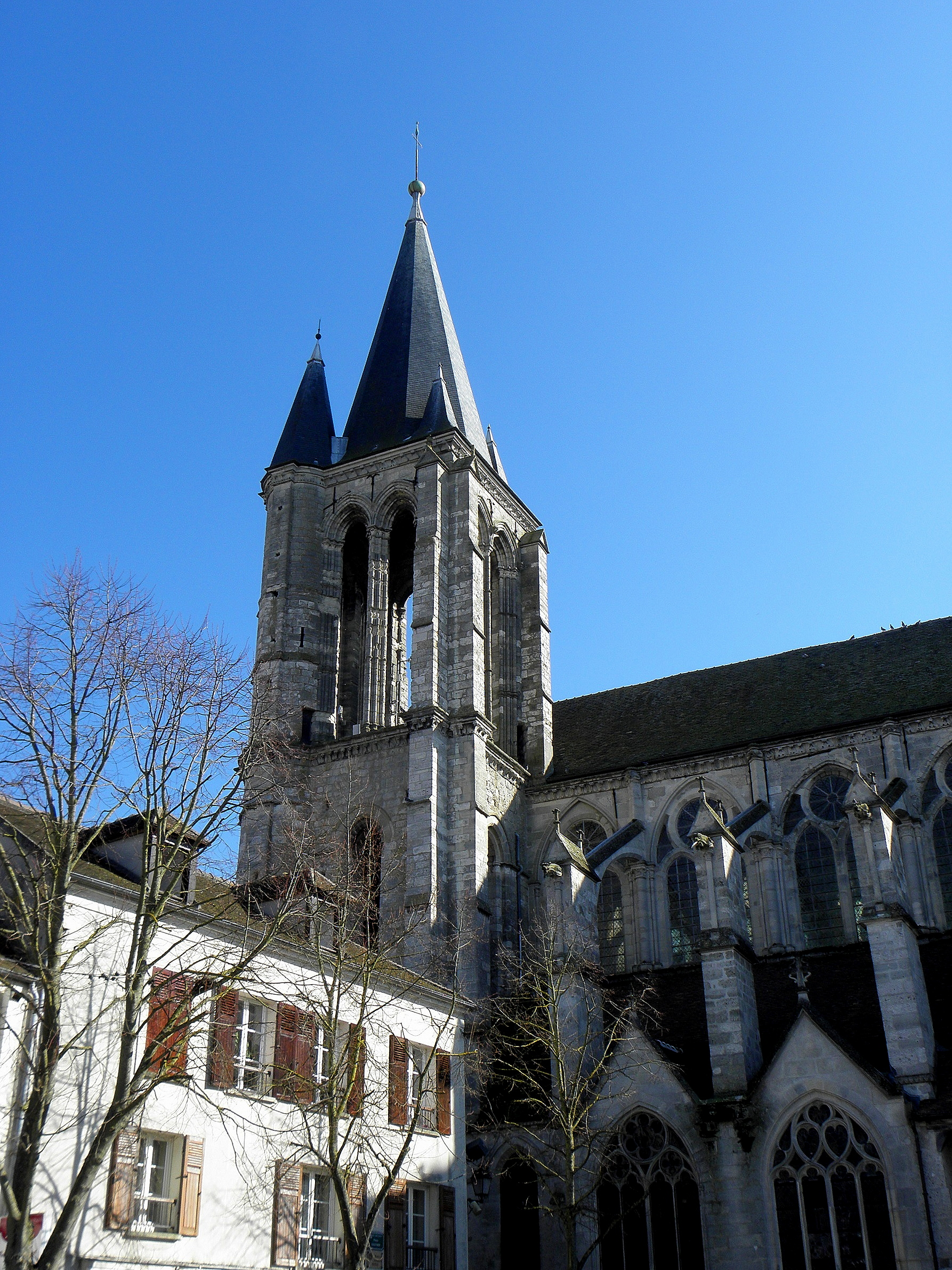 Extérieur de l'église Saint-Étienne de Brie-Comte-Robert (77). Vue septentrionale.